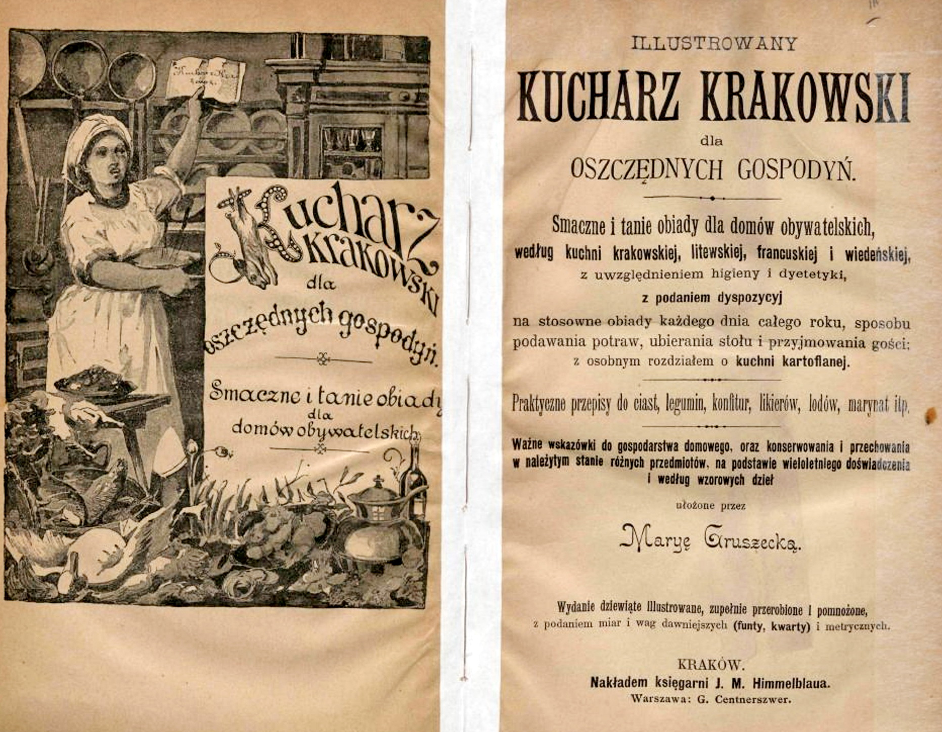 Strona tytułowa księgi "Ilustrowany Kucharz Krakowski dla oszczędnych gospodyń", Maria Gruszecka, 1895